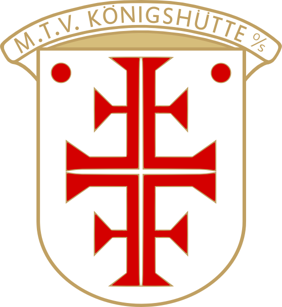 Logo des MTV Königshütte.